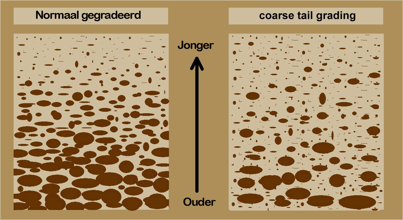 Schematische weergave van gegradieerde gelaagdheid in sedimentair gesteente